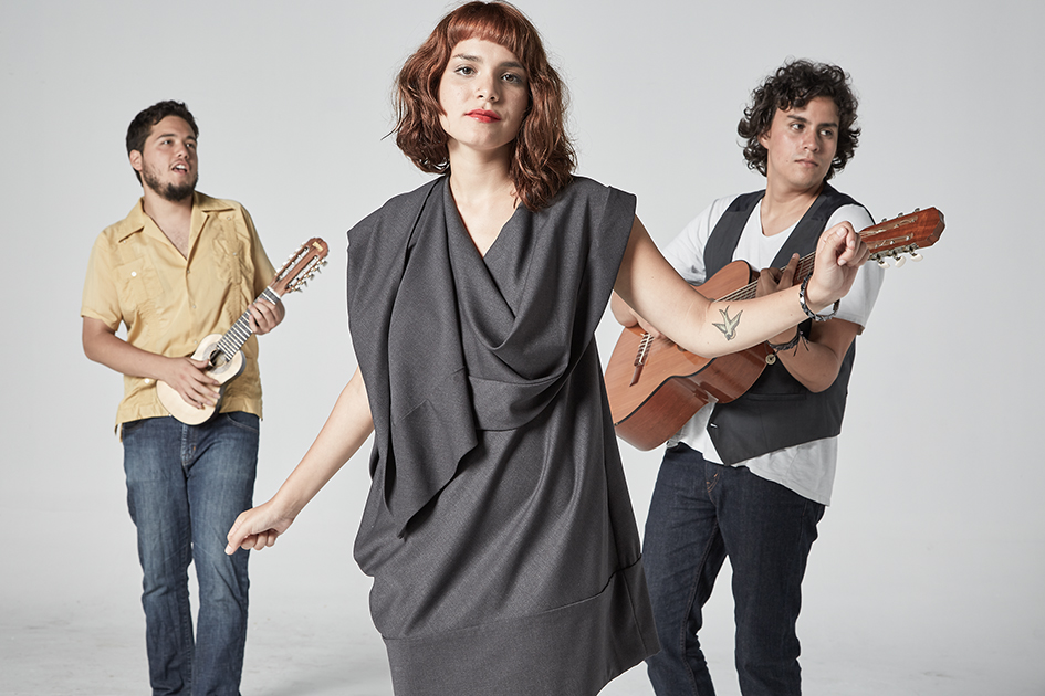 Ves tal vez